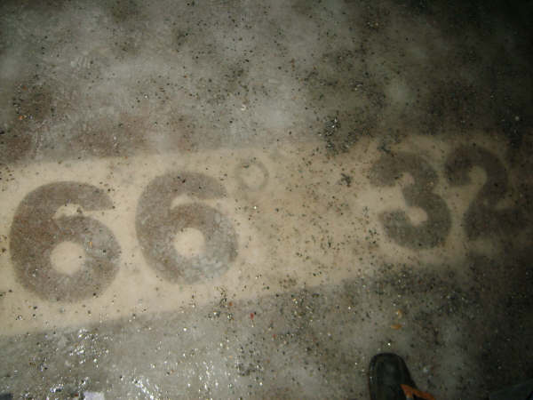 Ruslan